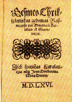 Martyno Mažvydo himnai parengti Baltramiejaus Vilento. Hymns of Martynas Mažvydas, compiled by Baltramiejus Vilentas. GESMES CHRIKSCZONISKAS, GEDOMAS BASZNICZOSU PER ADUENTA IR KALEDAS IK GRAMNICZU.